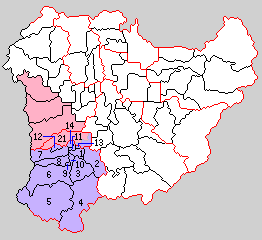 奈良県葛上郡・忍海郡（後の南葛城郡）の町村制時点の町村。